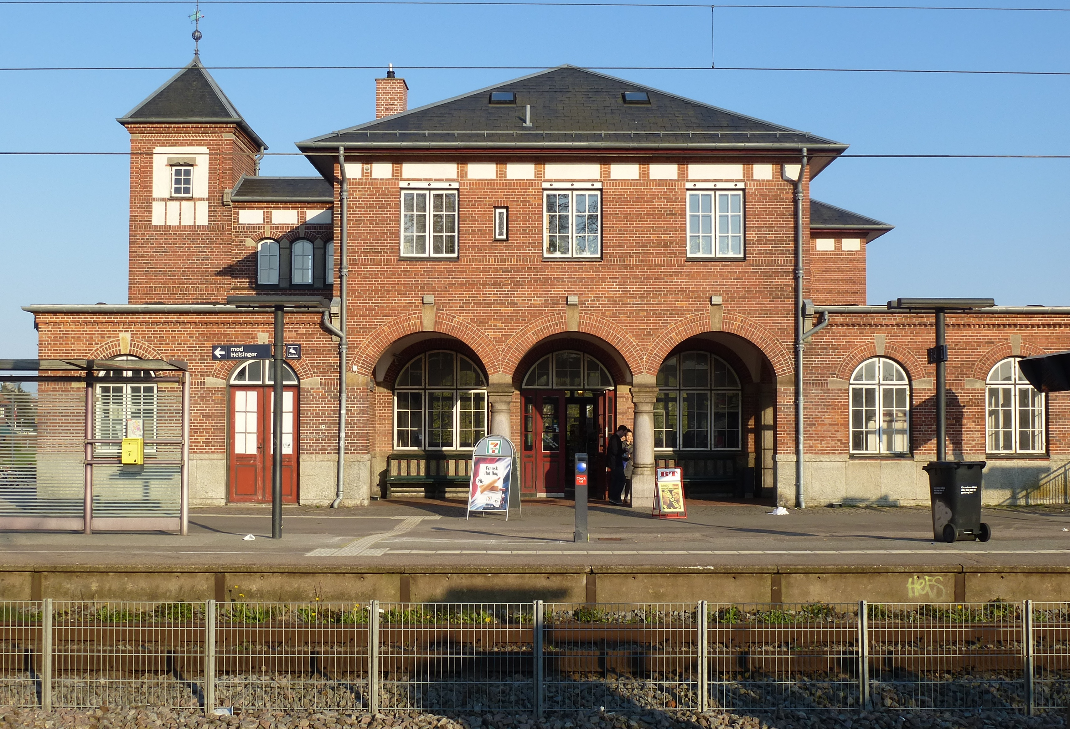 Humlebaek Railway Station in Humlebæk, Denmark